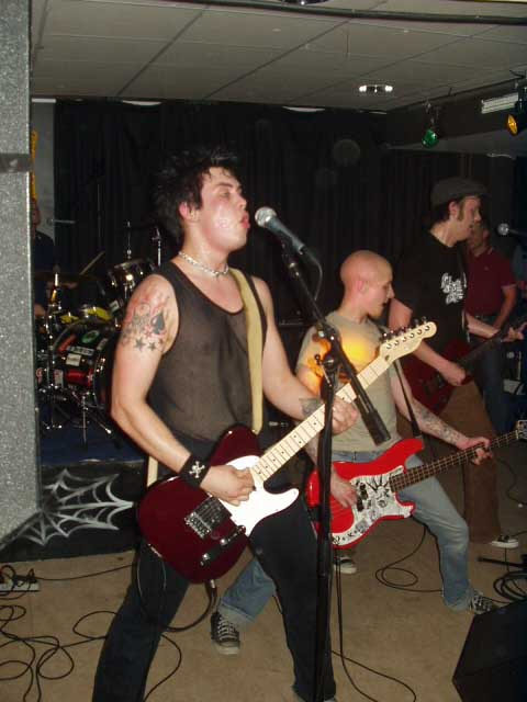 En bild på Blisterhead när de spelade på Klubb Utopi i Skövde